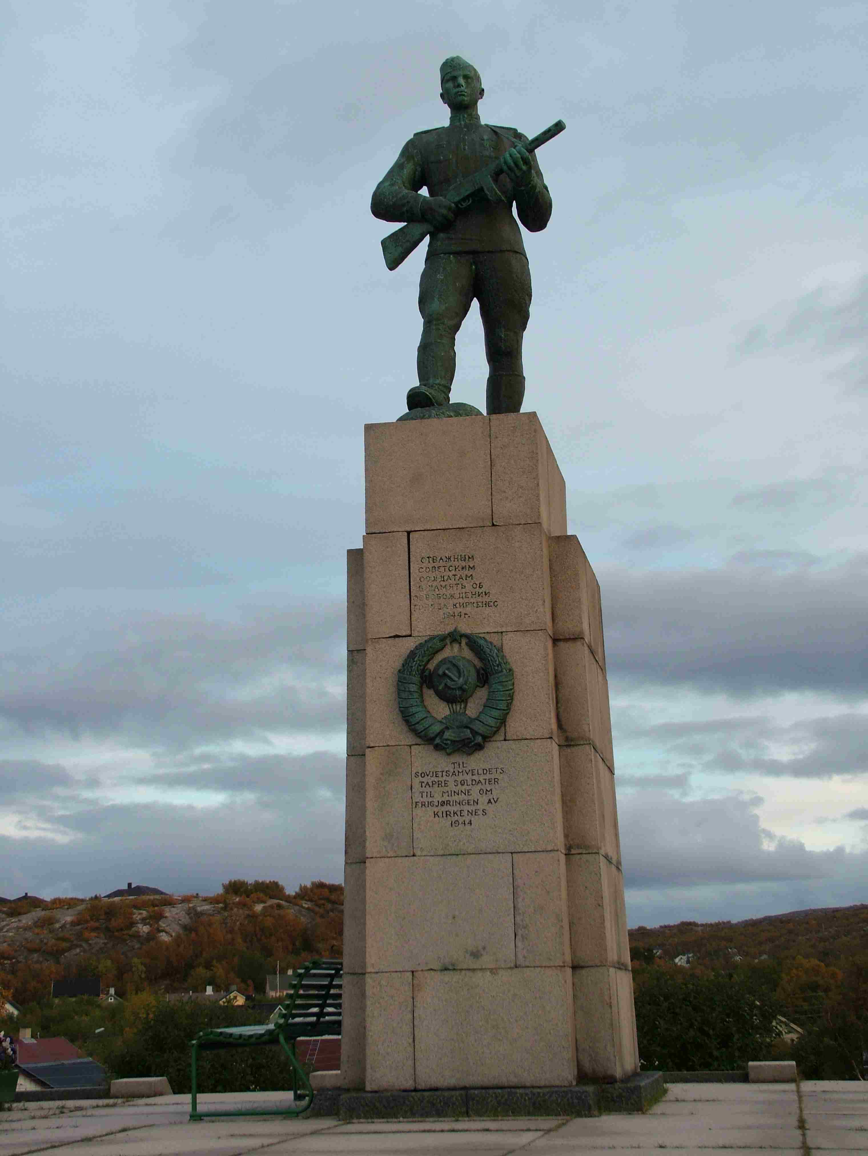 Kirkenes in der Finnmark in Norwegen. Das Denkmal soll an die gefallenen Soldaten der Sowjetunion im Zweiten Weltkrieg erinnern.